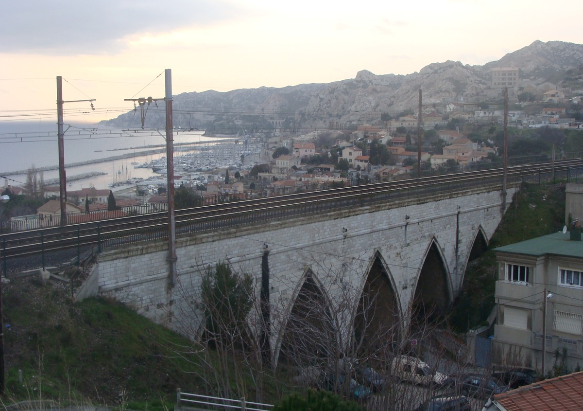 Le viaduc de la montée Pichou, sur la ligne Marseille - Paris, à la sortie nord de l'Estaque. Au fond, la "côte bleue".